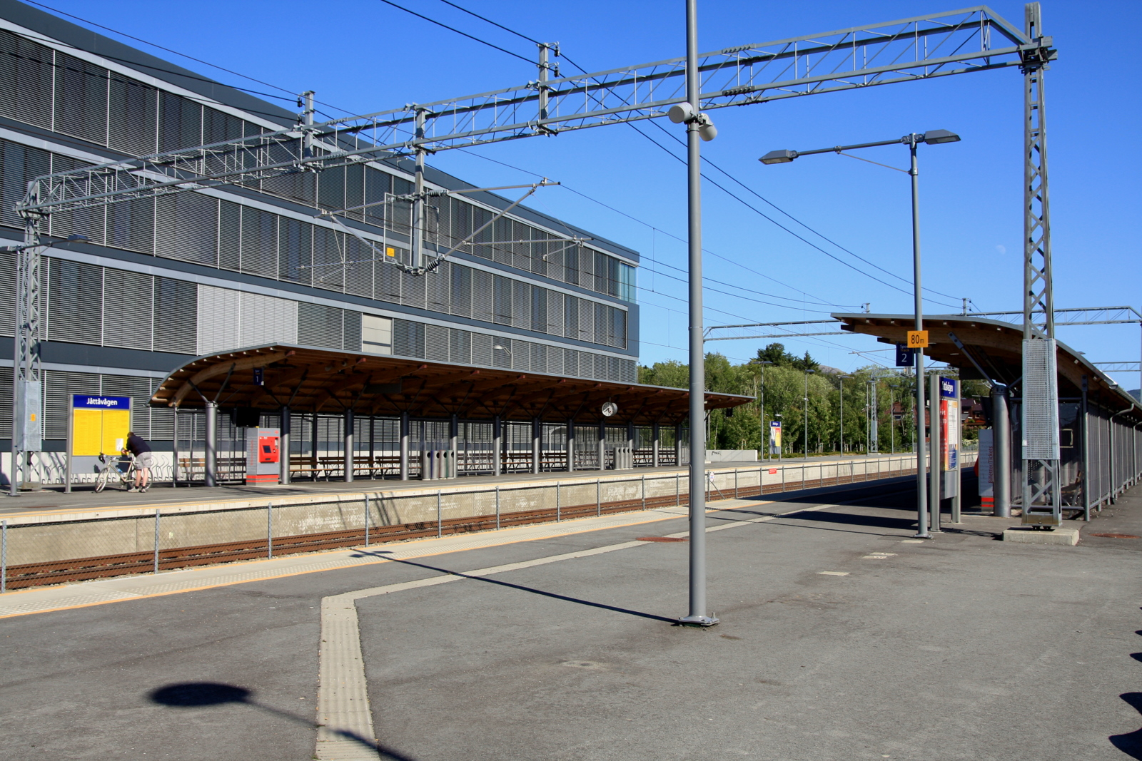 Jåttåvågen holdeplass